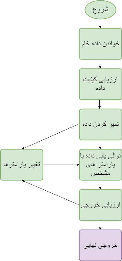 مراحل طی شده در توالی یابهای دنوو